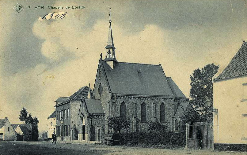 La chapelle de Lorette (Ath, Belgique)